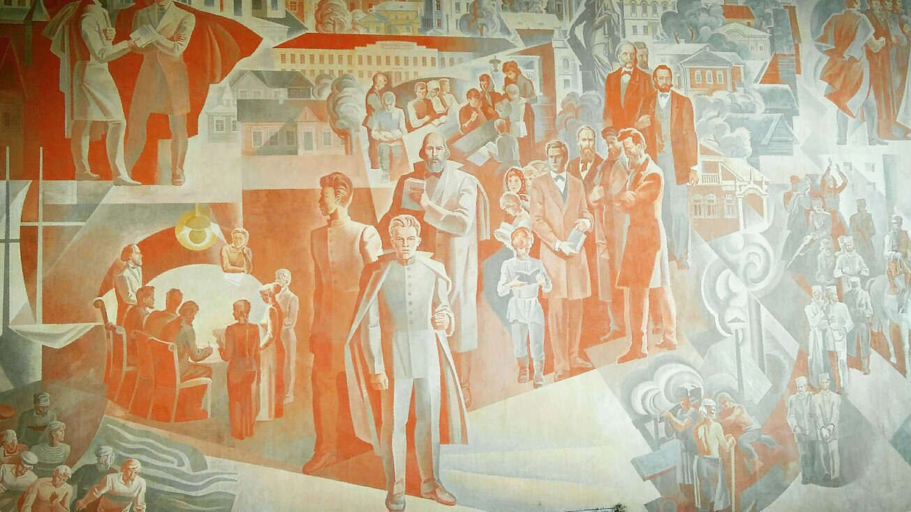 Мозаичное панно в стиле социалистический реализм